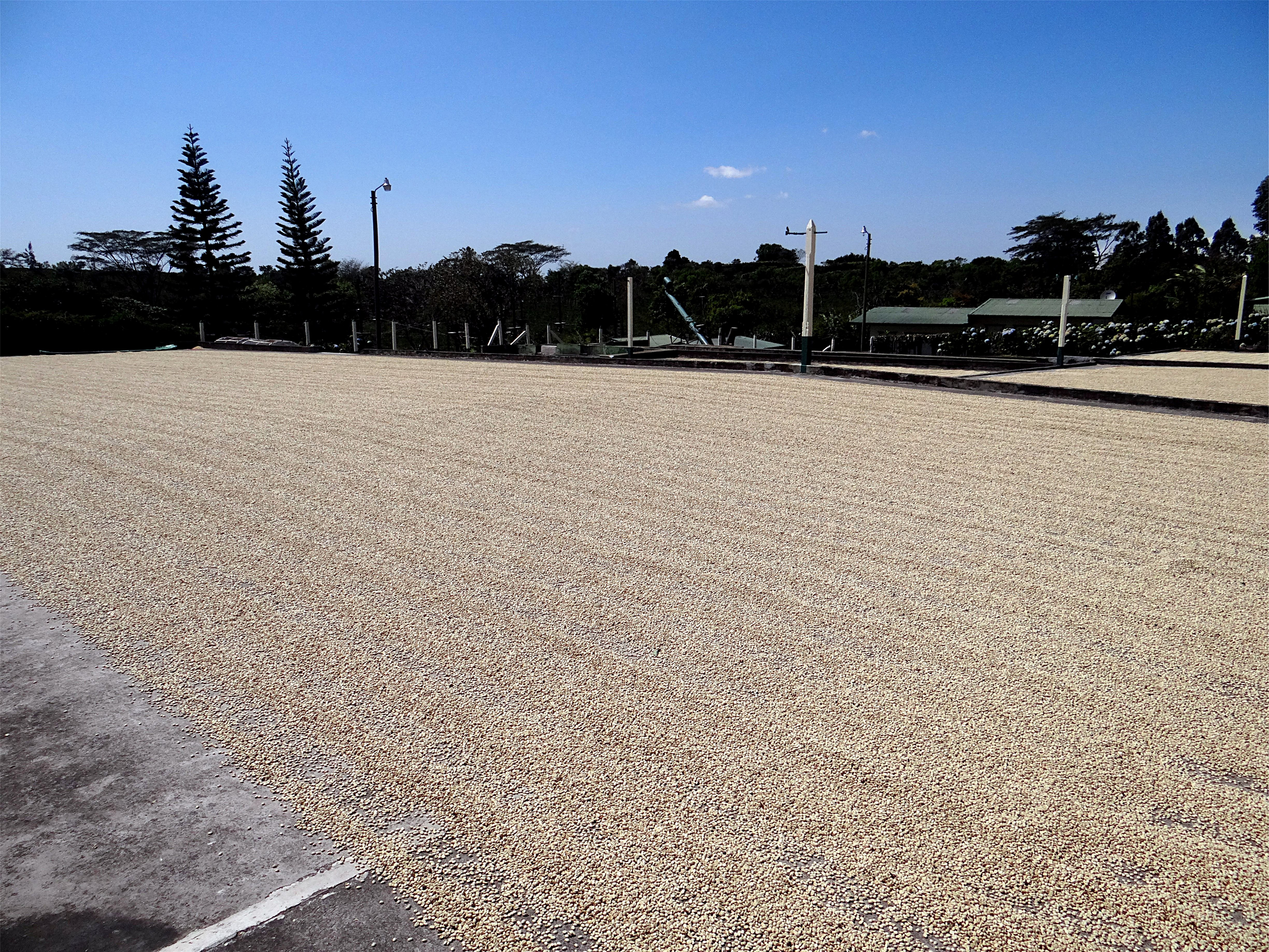 Séchage au soleil des fèves, manufacture Doka Estate, Sabanilla (Alajuela), Costa Rica.